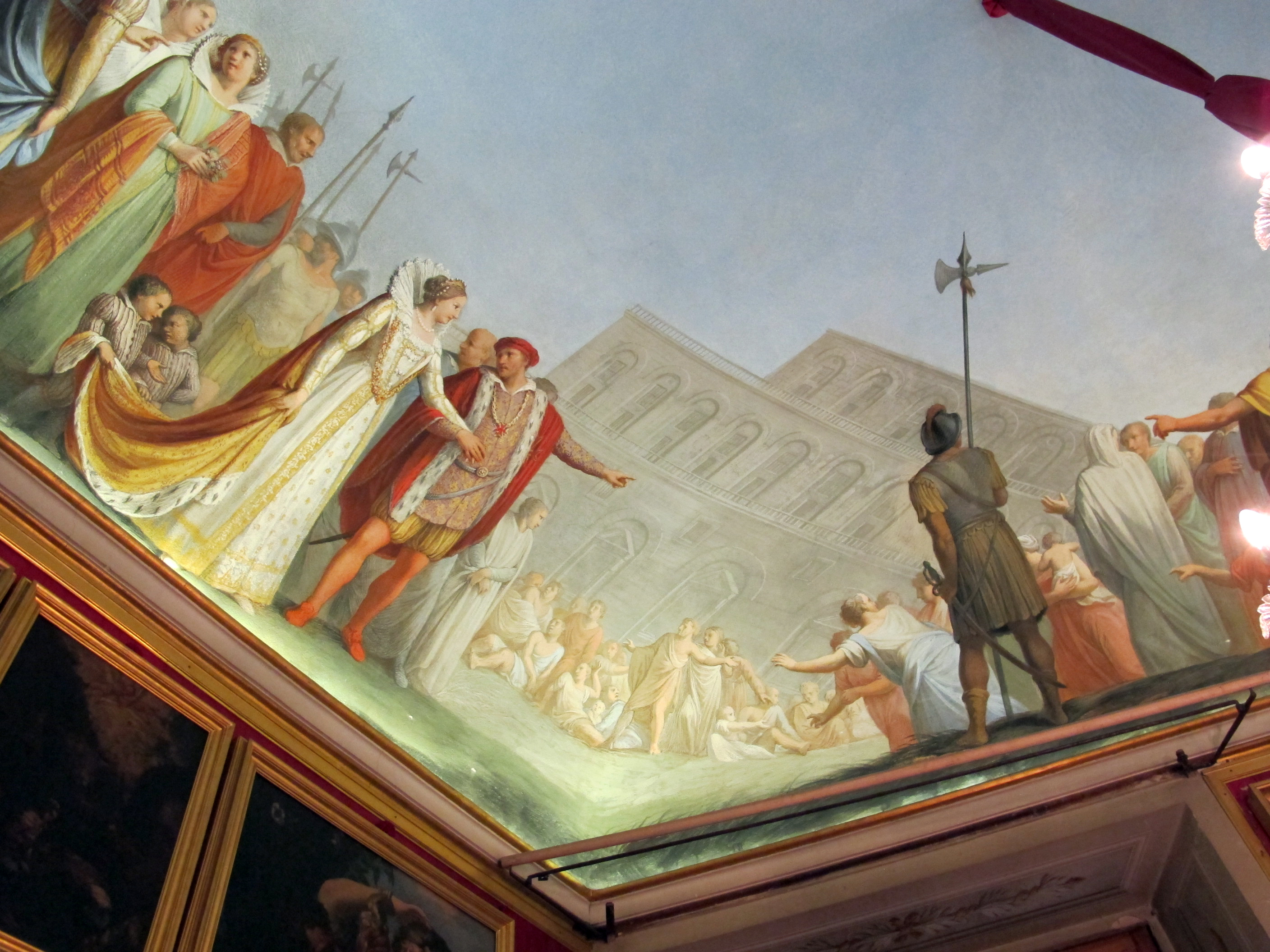 Museo di Casa Martelli - MIBAC This is a photo of a monument which is part of cultural heritage of Italy.